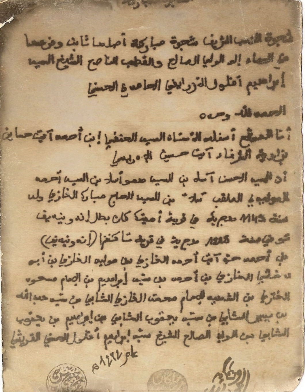 Arbre genealogique de sont arrière-petit-fils, Lahcen ibn 'Amo ibn Ahmad "Sala" ibn Mbark Al-Ghazi